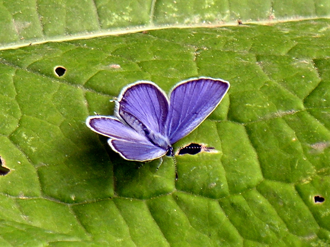 Everes argiades; Cupido (Everes) argiades Pall. Lithuanian: Uodegotasis melsvys